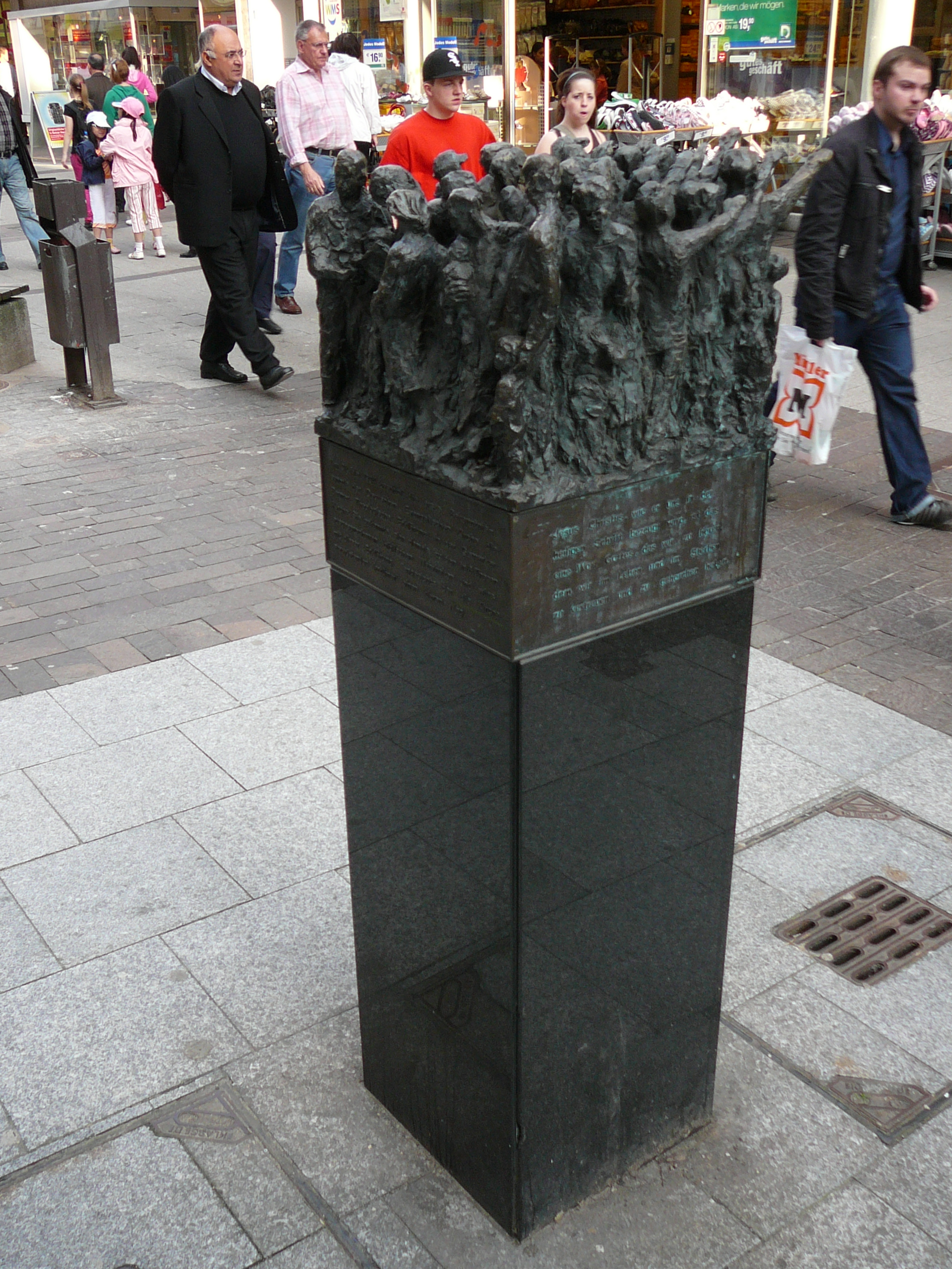 Werth, Wuppertal-Barmen